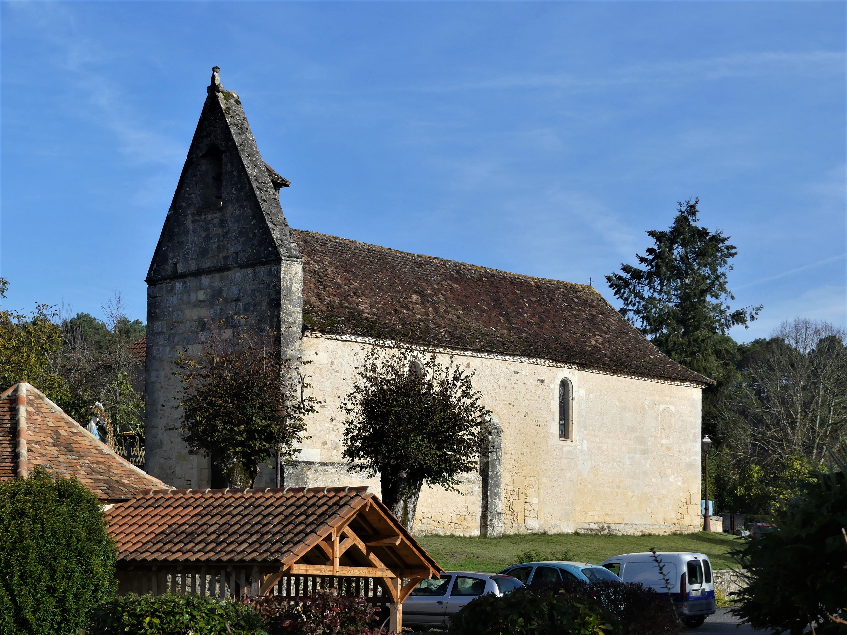 L'église de Laveyssière, Dordogne, France.